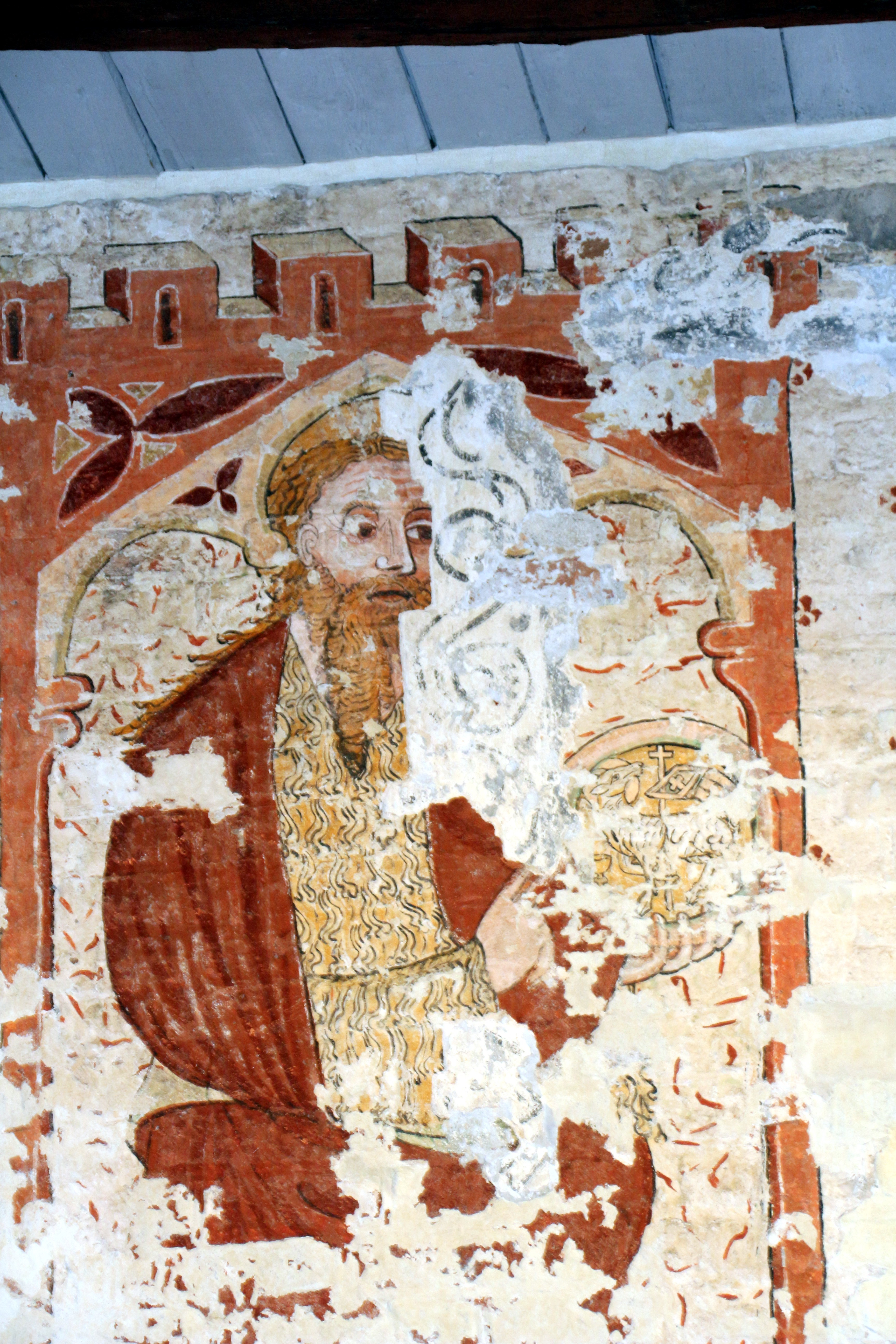 Johannes der Täufer auf einem Wandgemälde in der Gertrudenherberge in Lübeck, Große Gröpelgrube 8, von ~ 1370